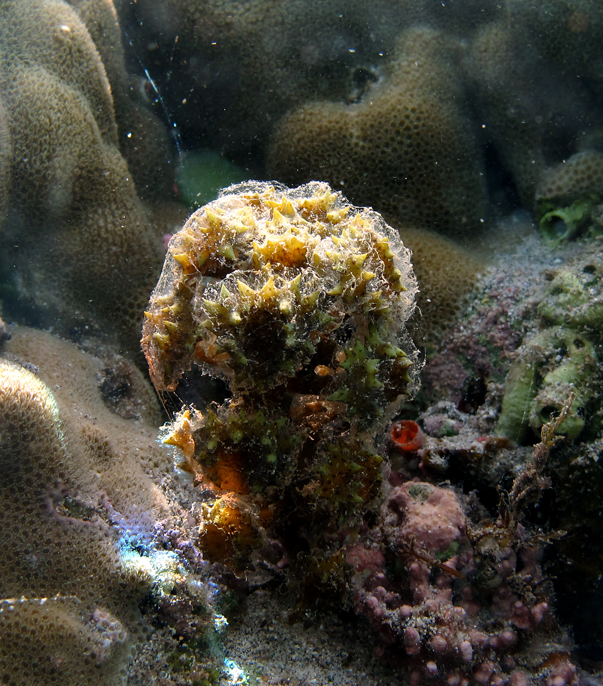 L'algue Turbinaria ornata à la Réunion.